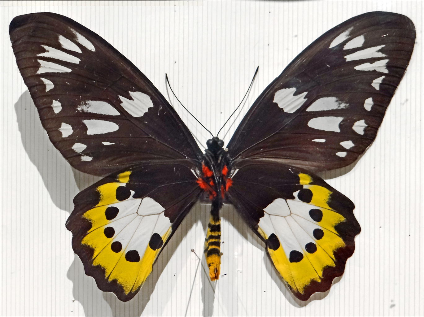 Ornithoptère paradisea arfakensis (femelle) Nouvelle-Guinée Museum d'histoire naturelle de Nantes article de Wikipedia sur le papillon La collection de Zoologie comprend plus de 1 600 000 spécimens regroupés en différents domaines, dont les plus importants sont les collections d'oiseaux, d'insectes et de coquillages. extrait du site officiel Site du Museum d'histoire naturelle de Nantes